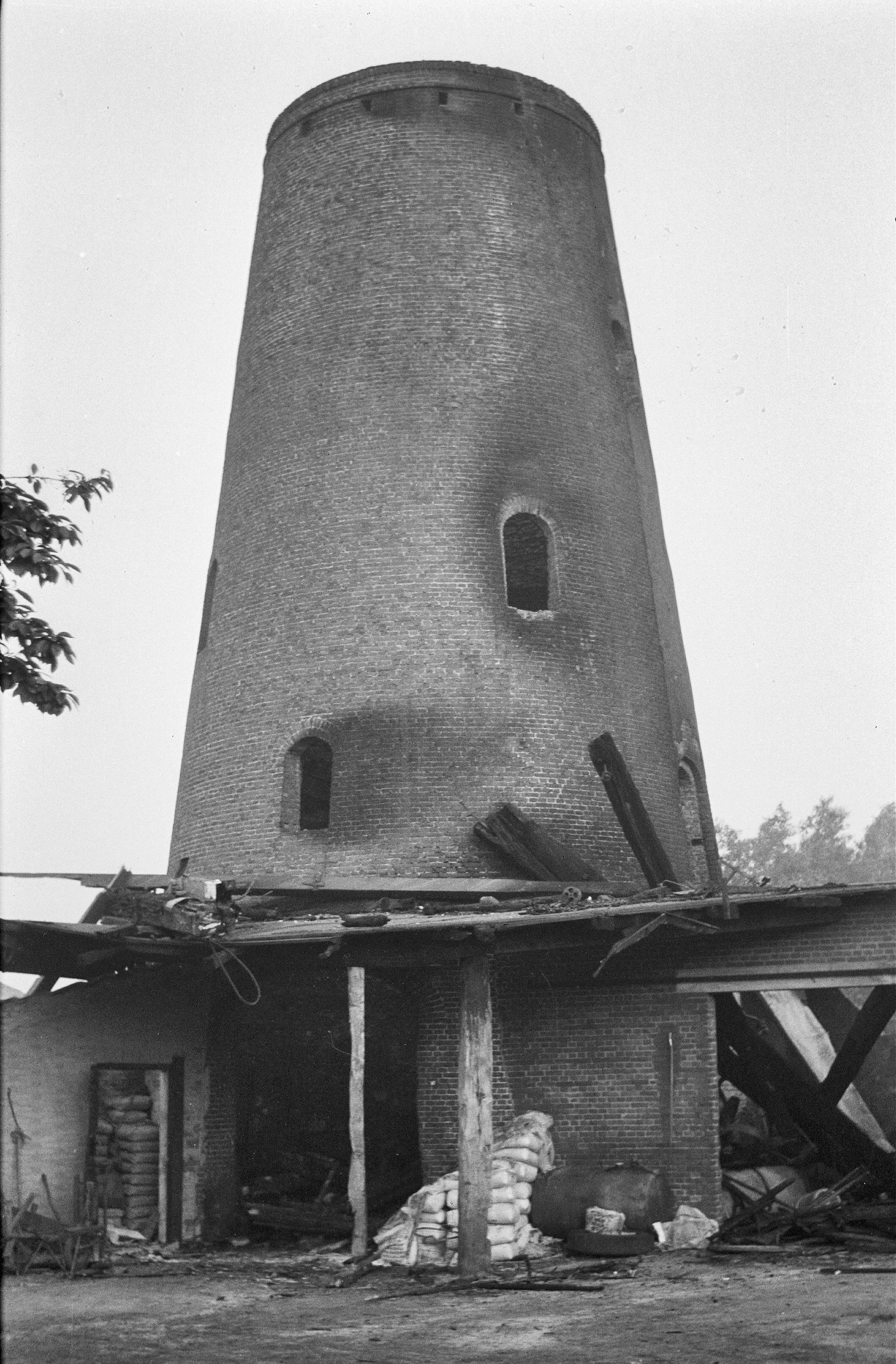 Diversen: Korenmolen, verbrande resten